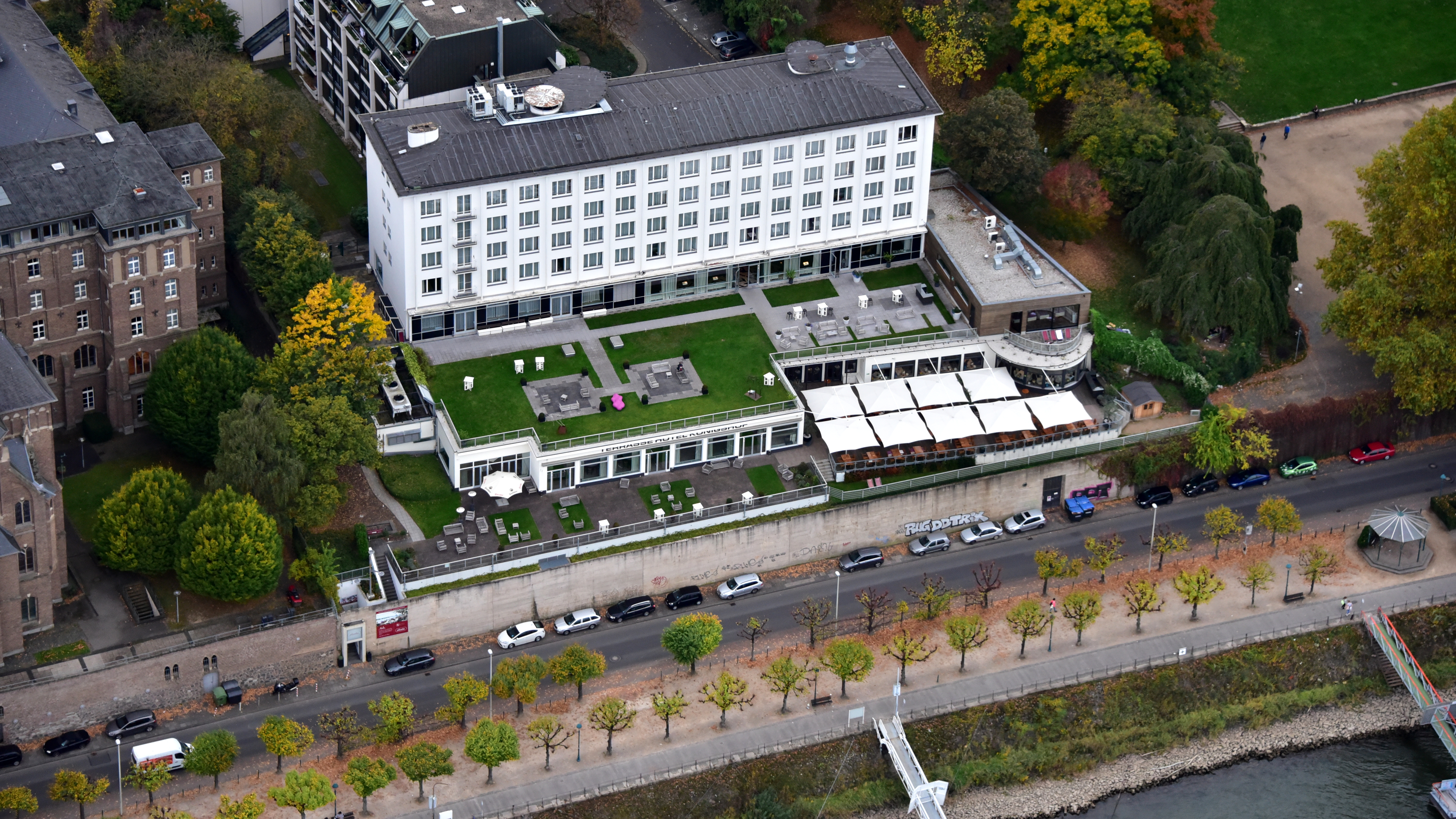 Hotel Königshof, Adenauerallee 9, Bonn-Südstadt: Luftaufnahme (2017)